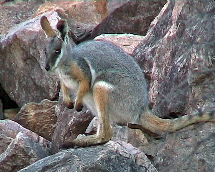 petrogale à pieds jaunes, (Petrogale xanthopus)